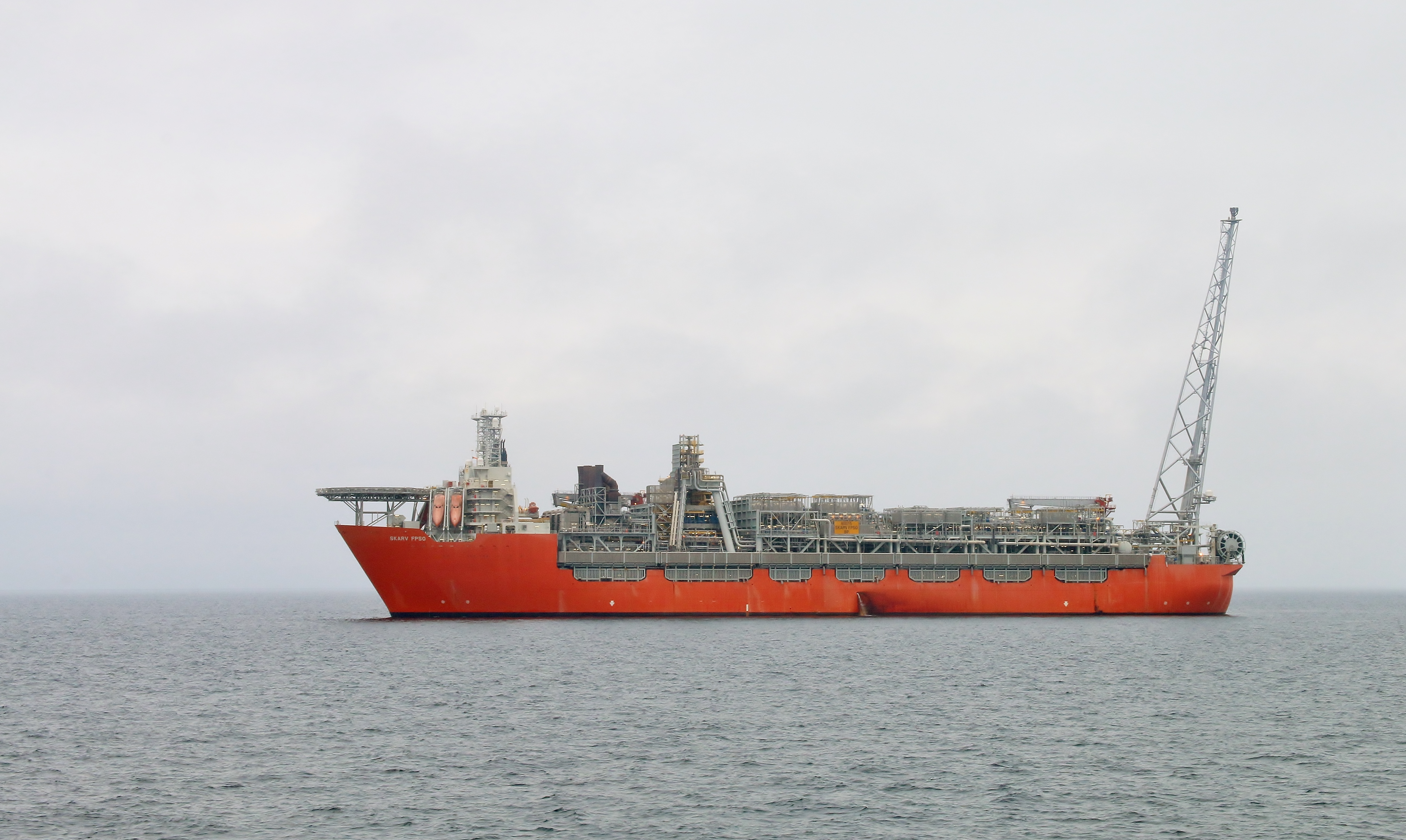 Reservoarene i Skarv inneholder gass og kondensat i sandstein i Garn-, Ile- og Tiljeformasjonene av mellomjura og tidligjura alder. Utbyggingskonseptet er et produksjons- og lagringsskip (FPSO) knyttet opp mot fem bunnrammer med femten brønner. Foto: Øyvind Knoph Askeland, Norsk olje og gass